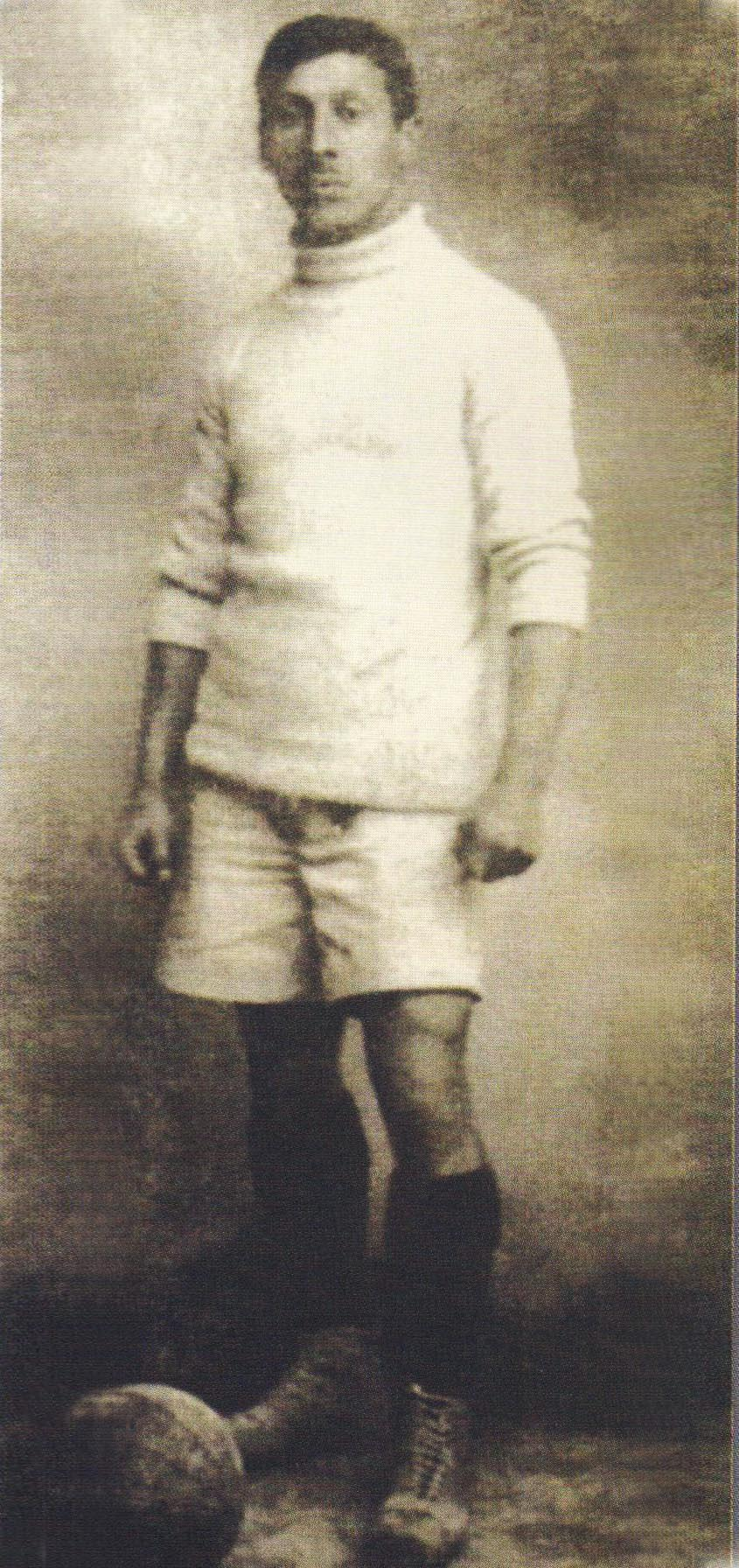 Φωτογραφία του Γιώργου Καλαφάτη κατά πρώτη δεκαετία του 1900, από άγνωστο δημιουργό. Επίσης δεν είναι γνωστό με ποιας ομάδας τα χρώματα αγωνίζεται.